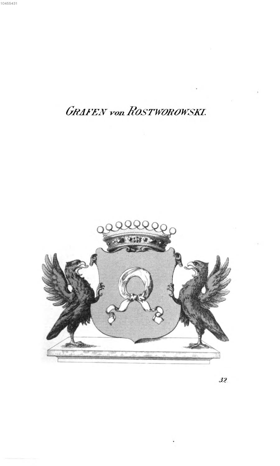 Wappen Rostworowski - Tyroff AT.jpg